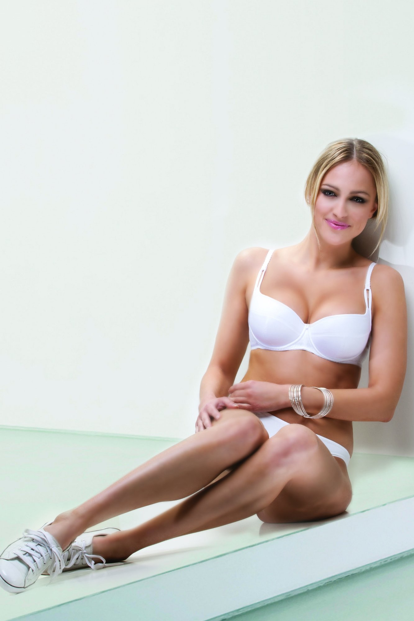 Podprsenka je vyrobena z prvotřídního úpletu a tenké bavlněné výztuže, která jemně modeluje poprsí a vytvoří svůdný dekolt. Rozšířená ramínka zvýší pohodlí při nošení.